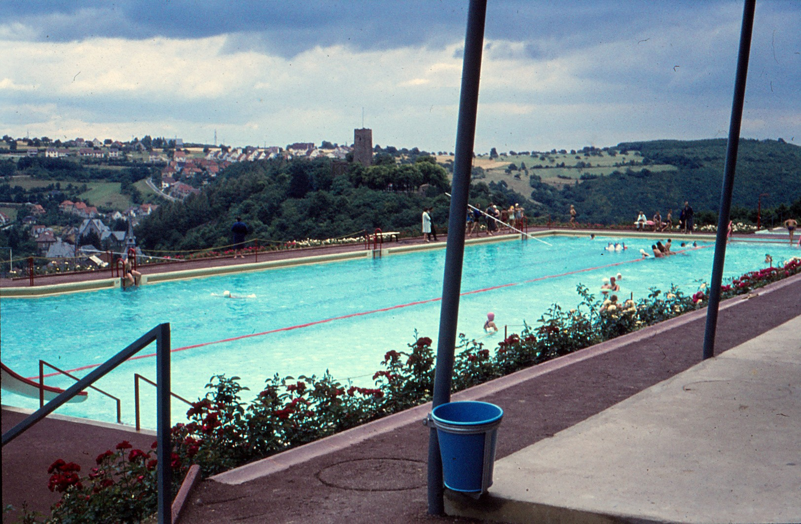 Am 14. Juli 1962 eröffnete das neu erbaute Höhenfreibad in Stromberg/Hunsrück. Die Aufnahme entstand im August 1962.